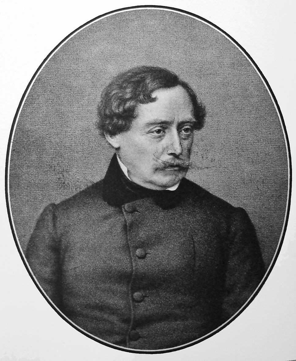 Christian Winther (29. juli 1796 i Fensmark ved Næstved - 30. november 1876 i Paris) var dansk digter.